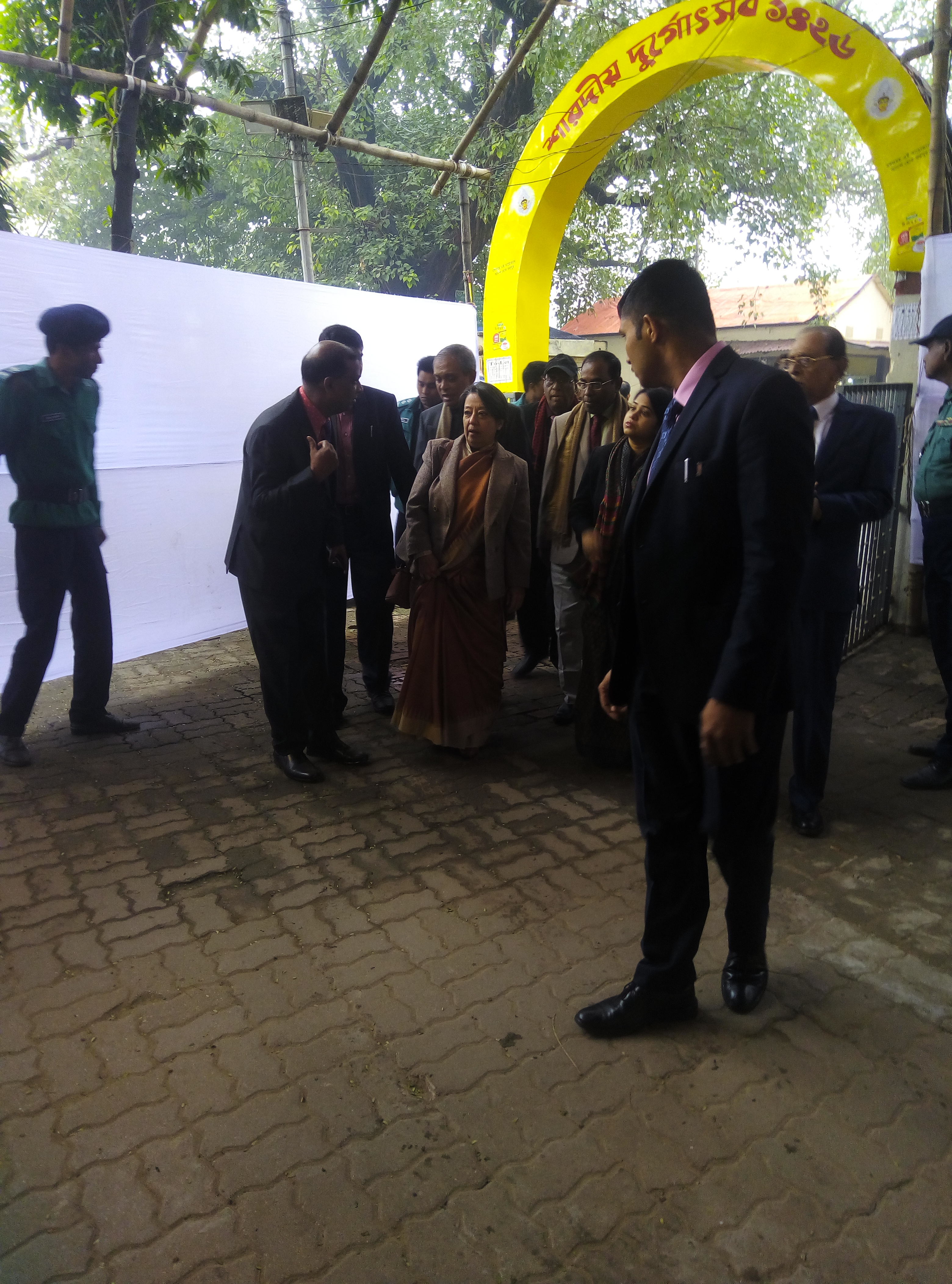 ২৭ ডিসেম্বর, ২০১৯ তারিখে ঢাকেশ্বরী মন্দিরে জাতীয় পর্যায়ে গীতা পাঠ প্রতিযোগিতার চূড়ান্ত পর্বে সভাপতির দায়িত্ব পালনকারী ও ঢাকাস্থ ভারতীয় হাইকমিশনার শ্রীমতি রীভা গাঙ্গুলী দাশের সংগৃহীত স্থিরচিত্র